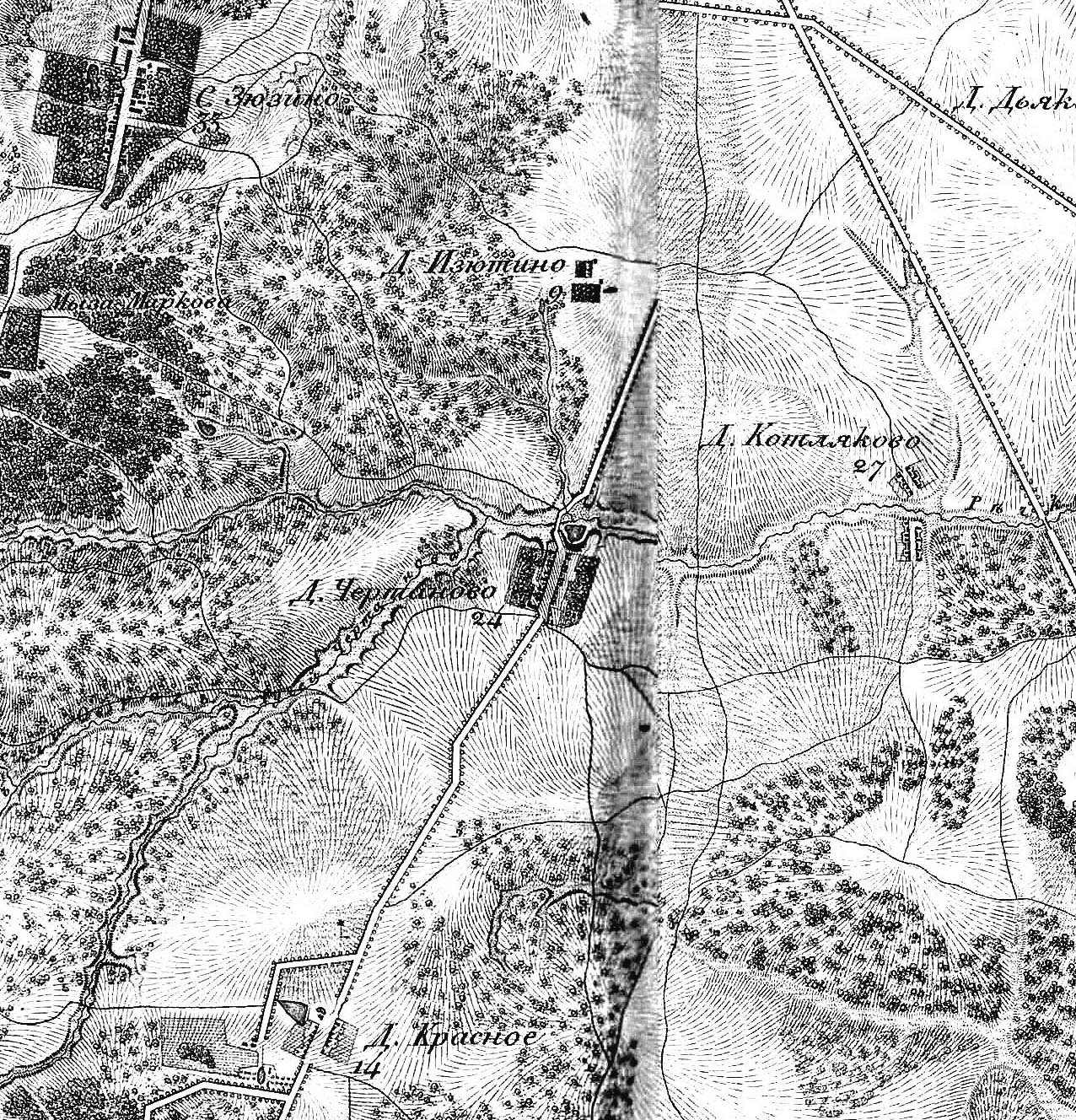 Топографическая карта окружности Москвы, 1818 год, фрагмент: Чертаново